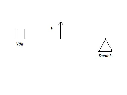 Bu kaldıraçta kuvvet kolu, yük kolundan kısadır. O yüzden, yükü kaldırmak için daha fazla kuvvet uygulanmalıdır.